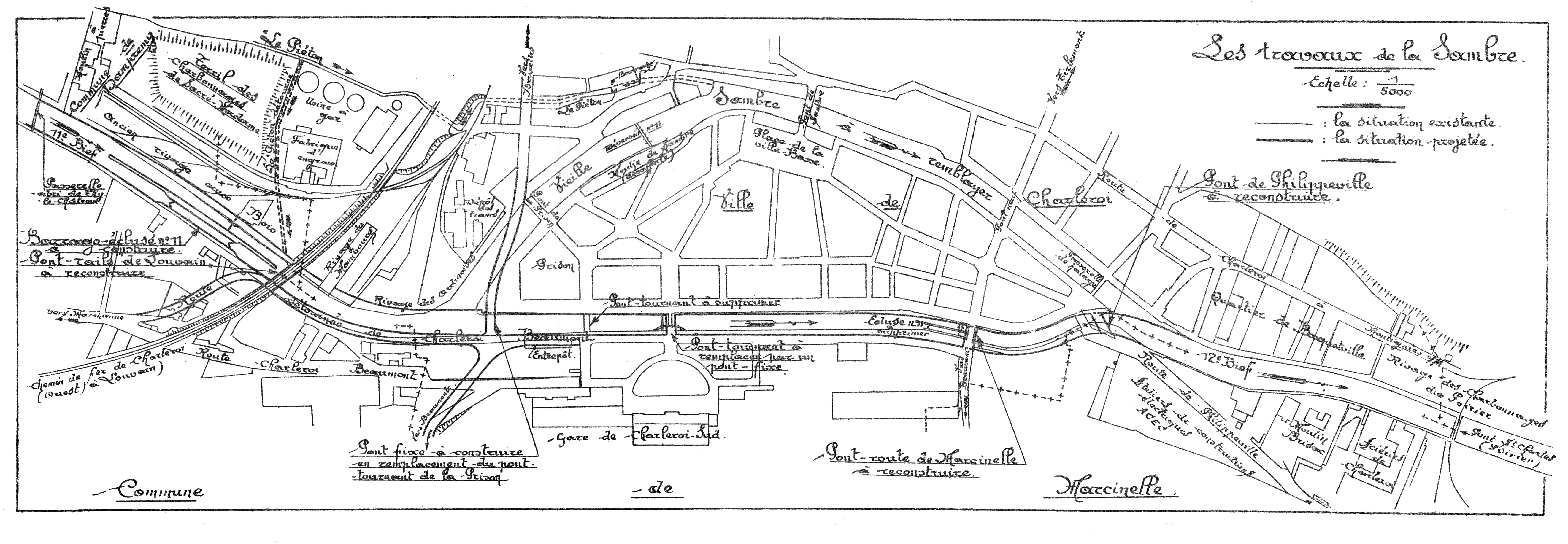 Sambre - Travaux de canalisation et de défense contre les inondations. Plan de la traversé de Charleroi (Belgique) - projet de 1930.